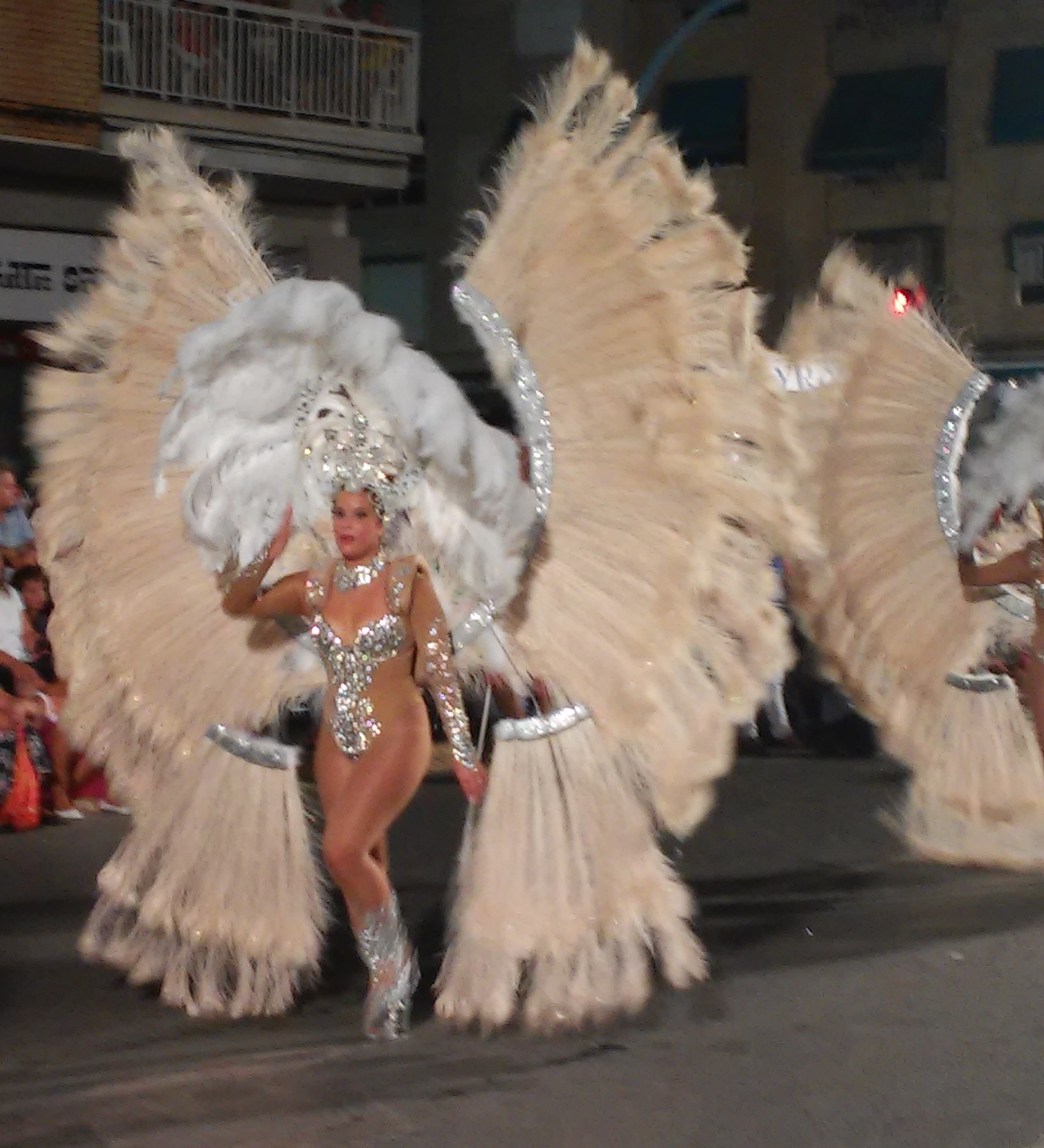 Carnaval de verano en Águilas (Murcia) This is a photography of a Folklore festival in Spain (Wikidata id Q5752929).